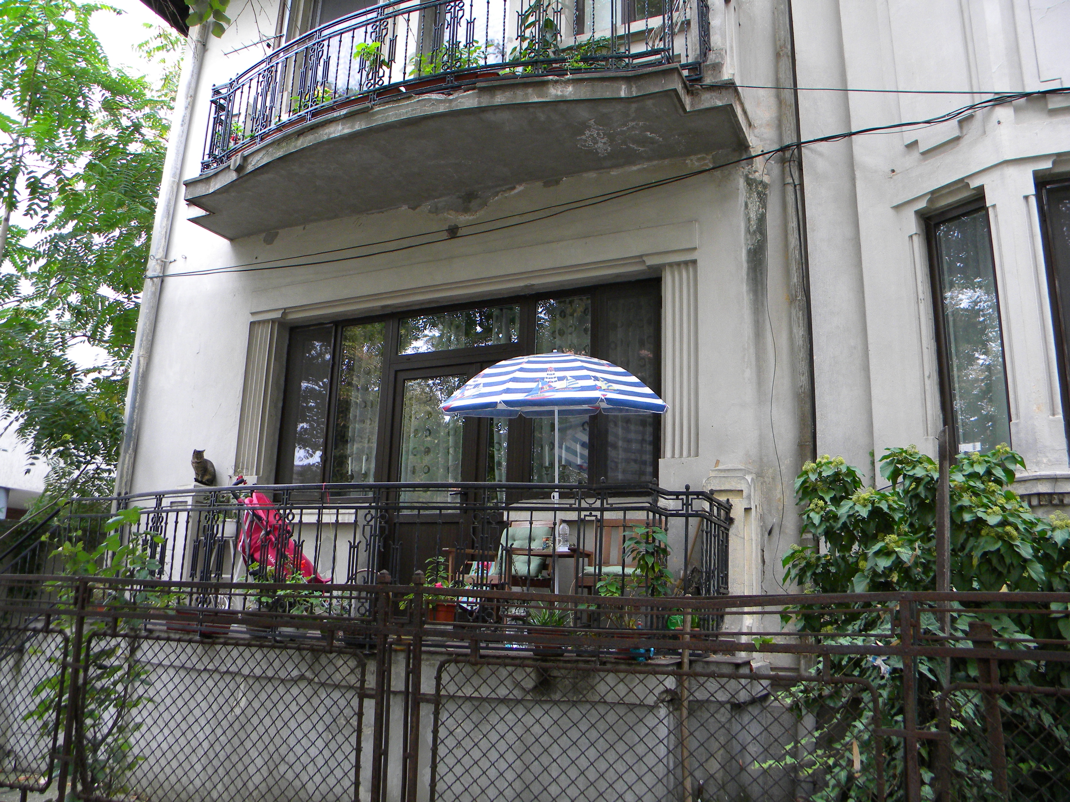 Bucuresti, Romania, Str. Praga nr. 4 (Vila)(2); B-II-m-B-19467